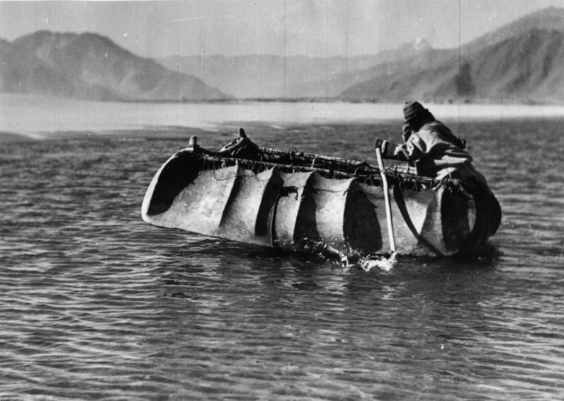 Chaksamfähre, Jakhautboote werden ins Wasser gesetzt und wieder heraus genommen (Überschreiten des (Kyiflusses?)